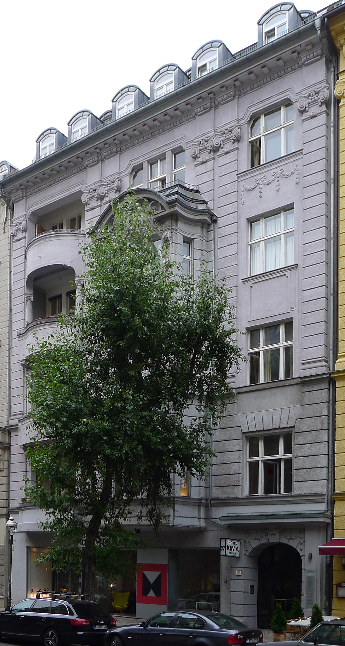 Mietshaus